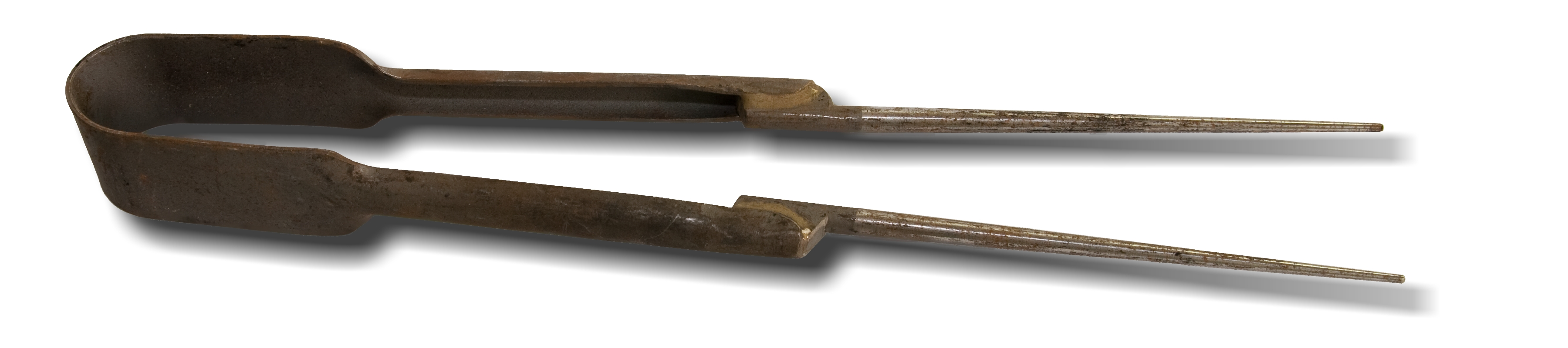 Česky: Aftraipšár, někdy nazývaný šoršal či roztočka, se ve sklářství používá na roztáčení džbánků či volejky (=malá lahvička na ocet/olej s ouškem, nebo bez) resp. vytahování skla do délky (například tahané štýlky (=stonek u kalíšku)). Sklárna Nenačovice, okres Beroun.